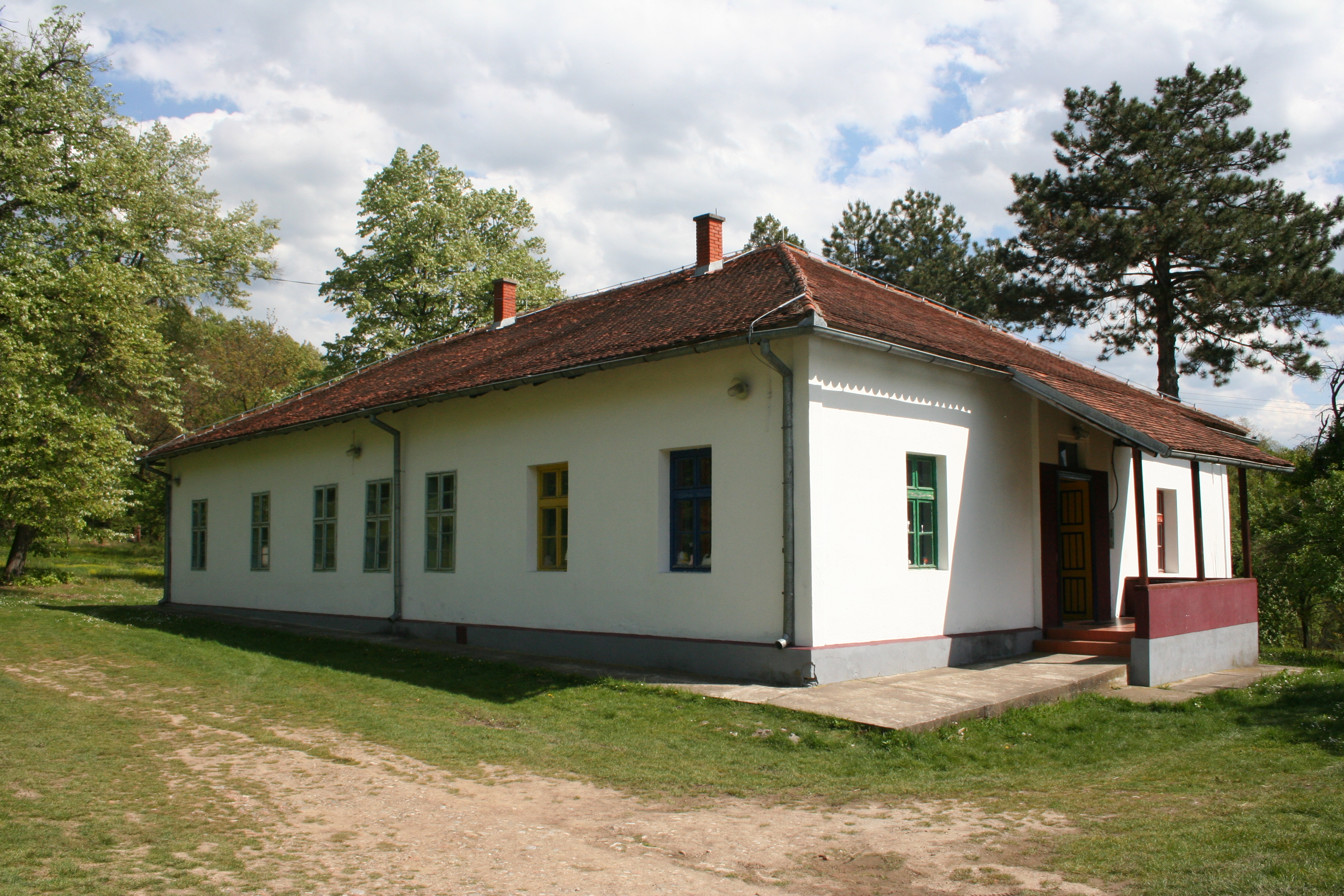 Stara škola u Rabrovici, Divci